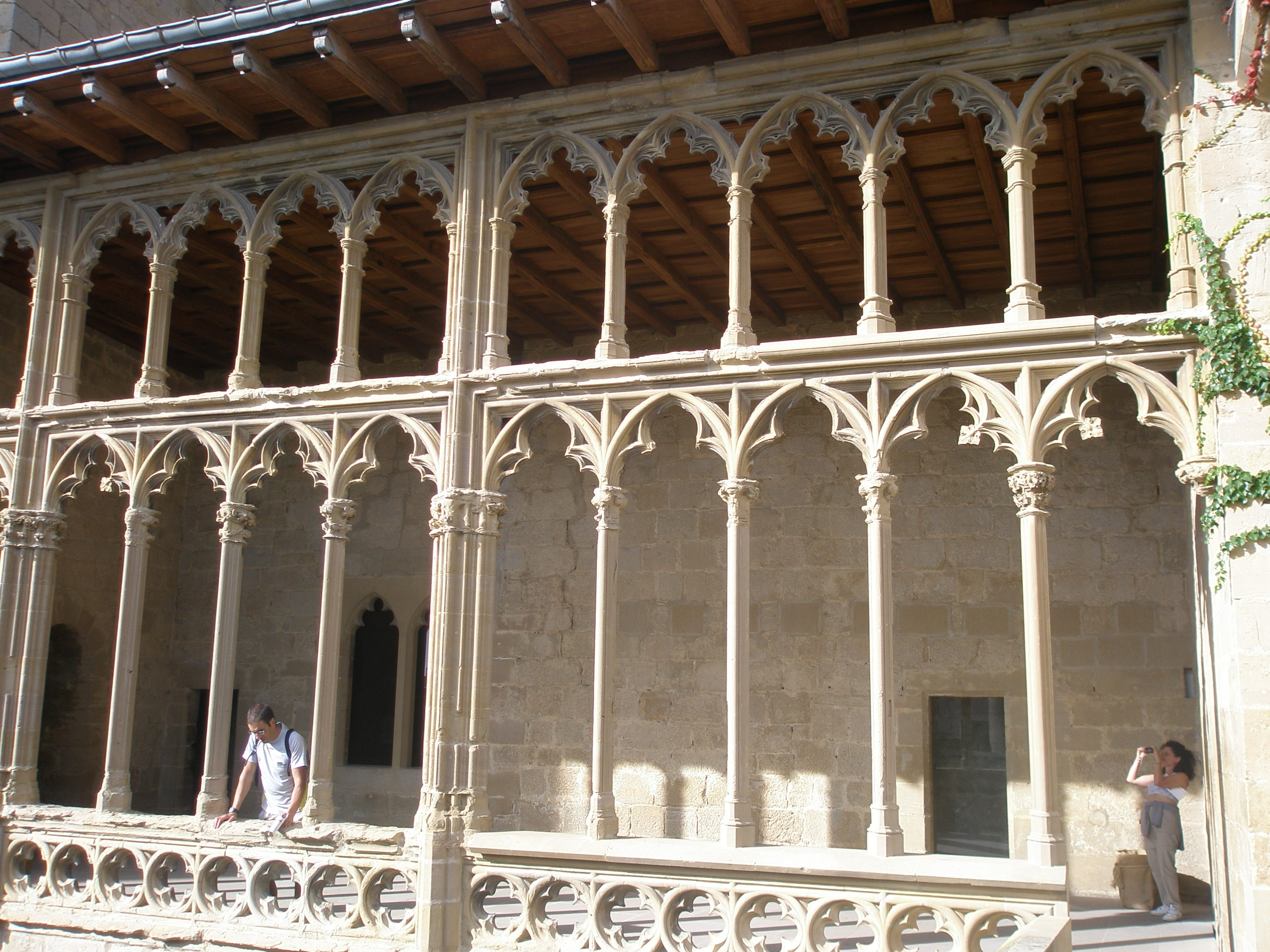 Galería de arcos gótica, en el palacio de Olite.